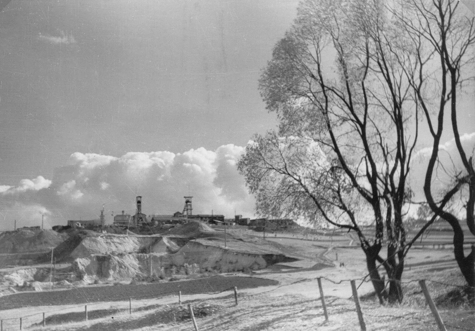 Grube Maffei, Auerbach